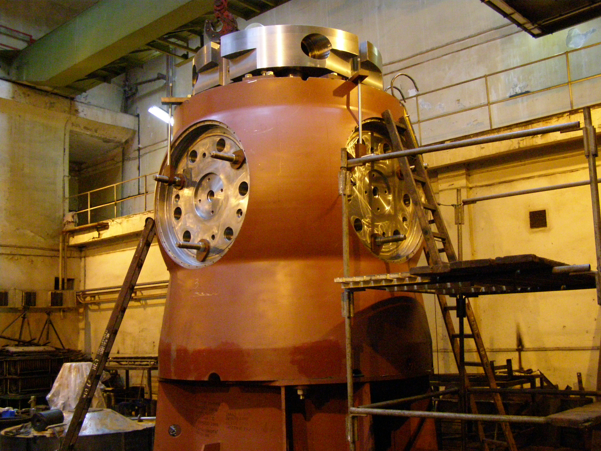 Корпус ротора турбины. Сборка турбины в машинном зале. Реконструкция ОАО «Турбоатом» 2008 г.